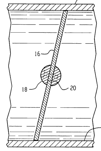 Butterfly valve, Valvola a Farfalla